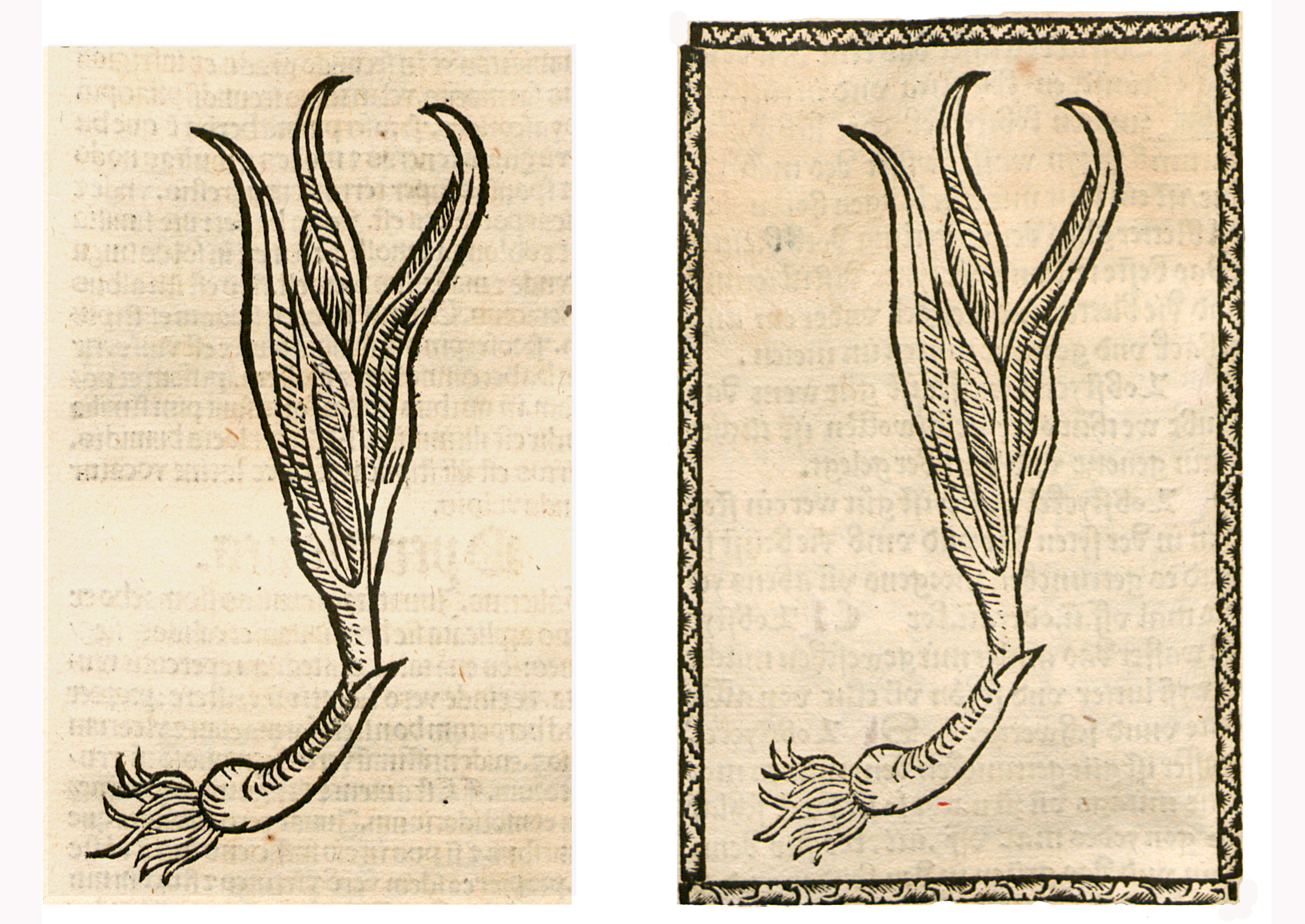 Abbildung von: Louch (Allium porrum)